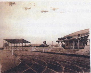 各務原運動場とB- 29